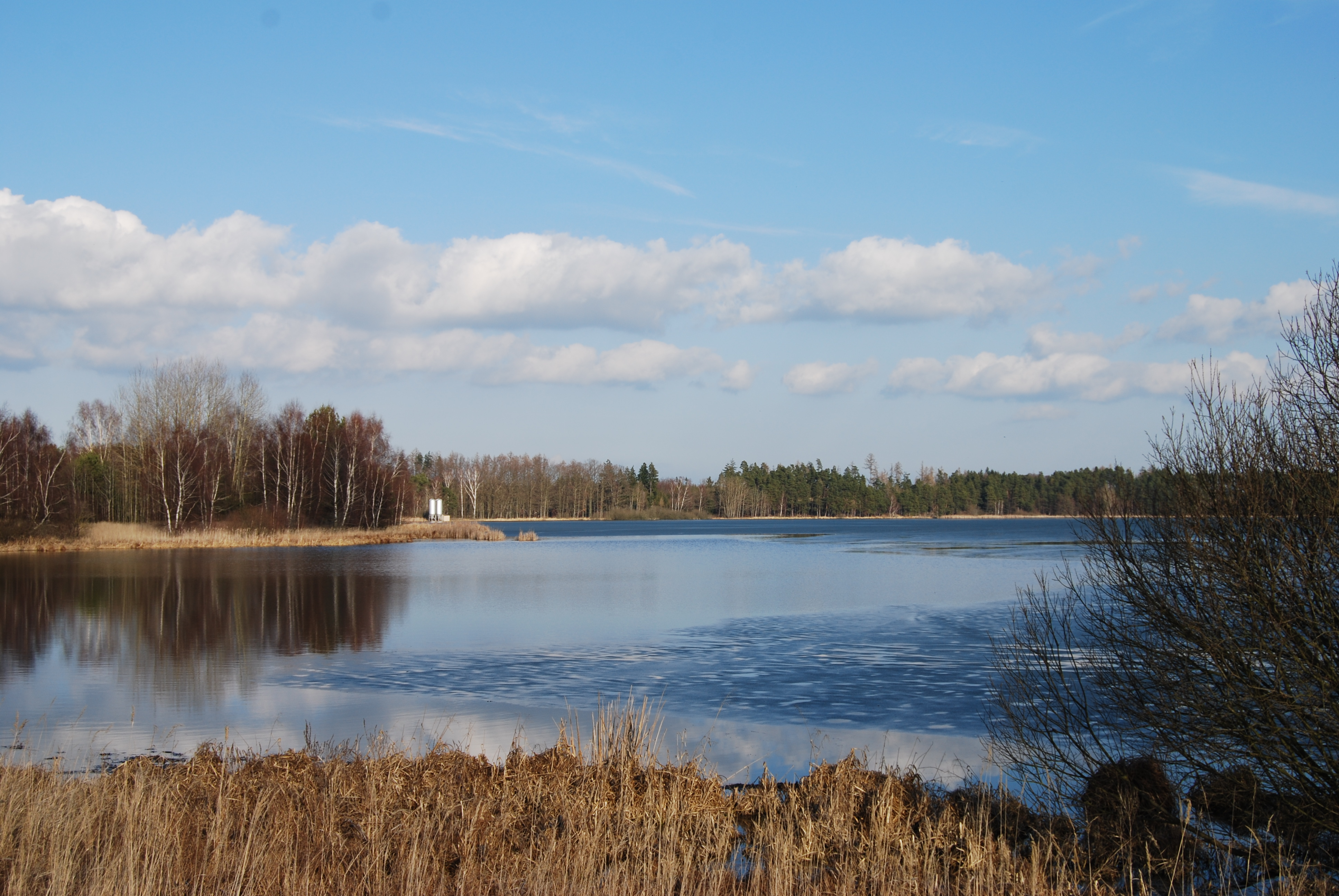 Rybník Milava. Pohled na rybník z komunikace Sedlice - Velká Turná. Okres Strakonice. Česká republika.